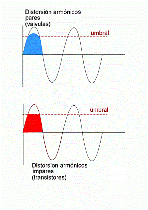 Rectificación de un error